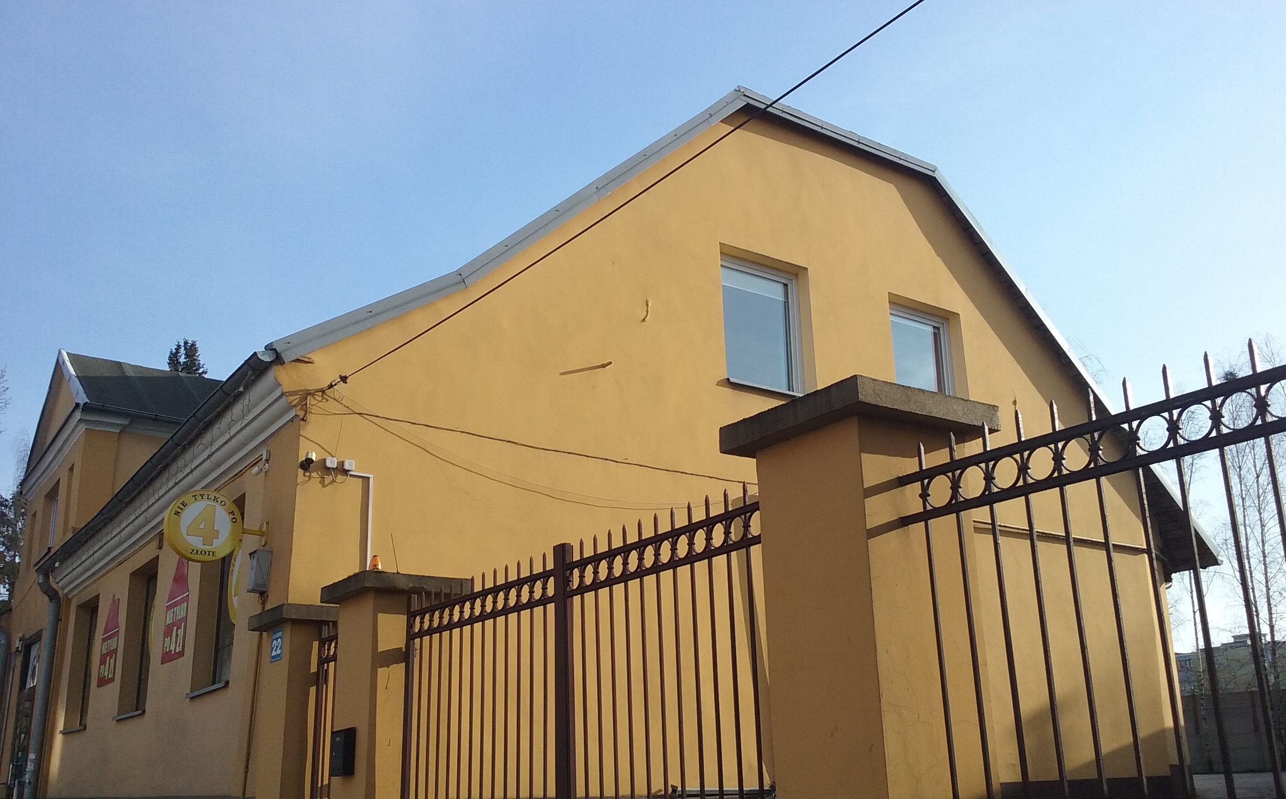 „Dom bednarza” - dom tkaczy, pierwszych osadników w Tomaszowie Mazowieckim. Obecnie ul. św.Antoniego